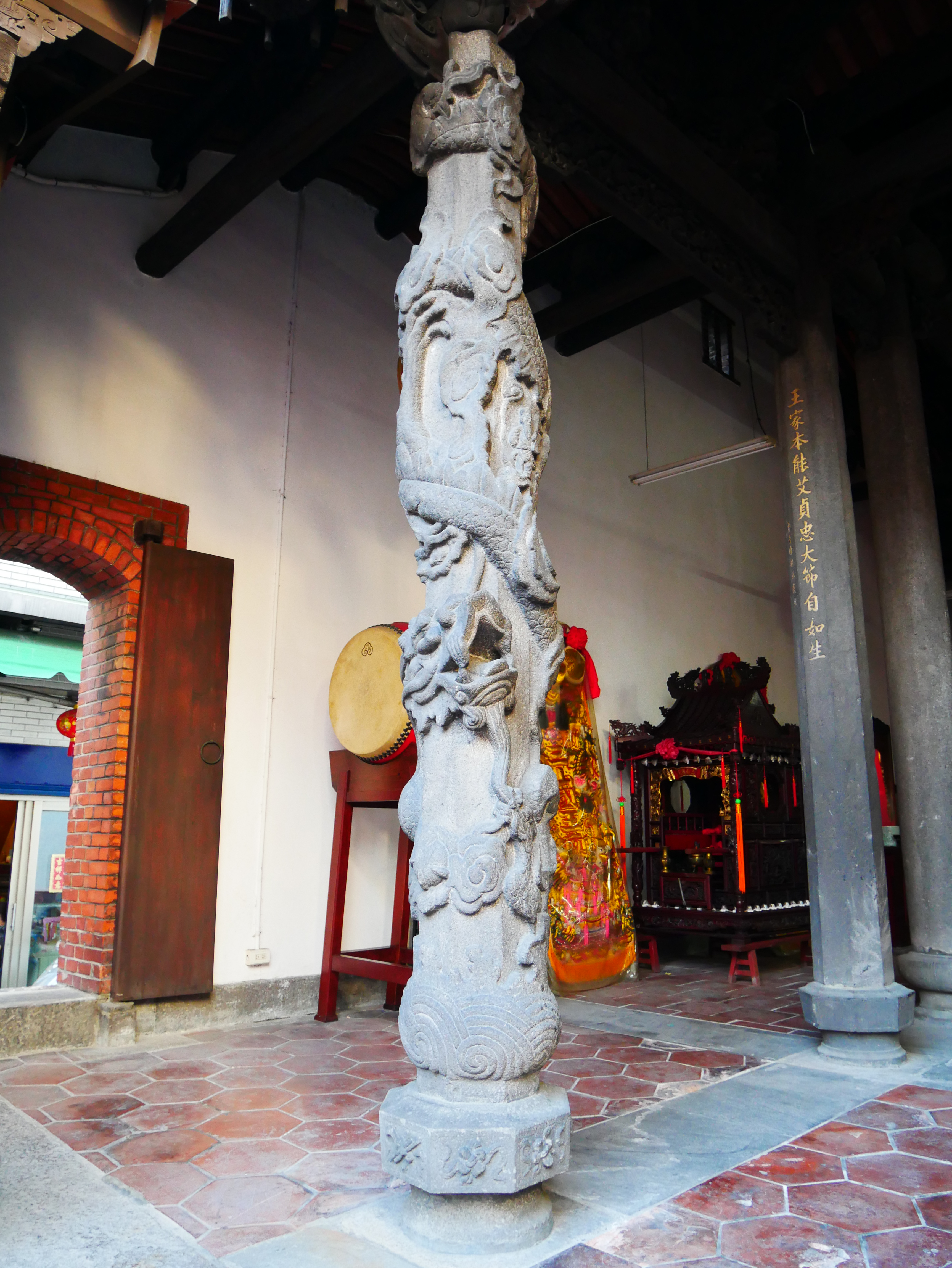 中文（台灣）: 新莊廣福宮正殿龍柱，新北市新莊區文德里